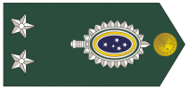 Insígnia de General de Brigada Shoulder strap rank insignia for General de Brigada (OF-7) of the Brazilian Army.